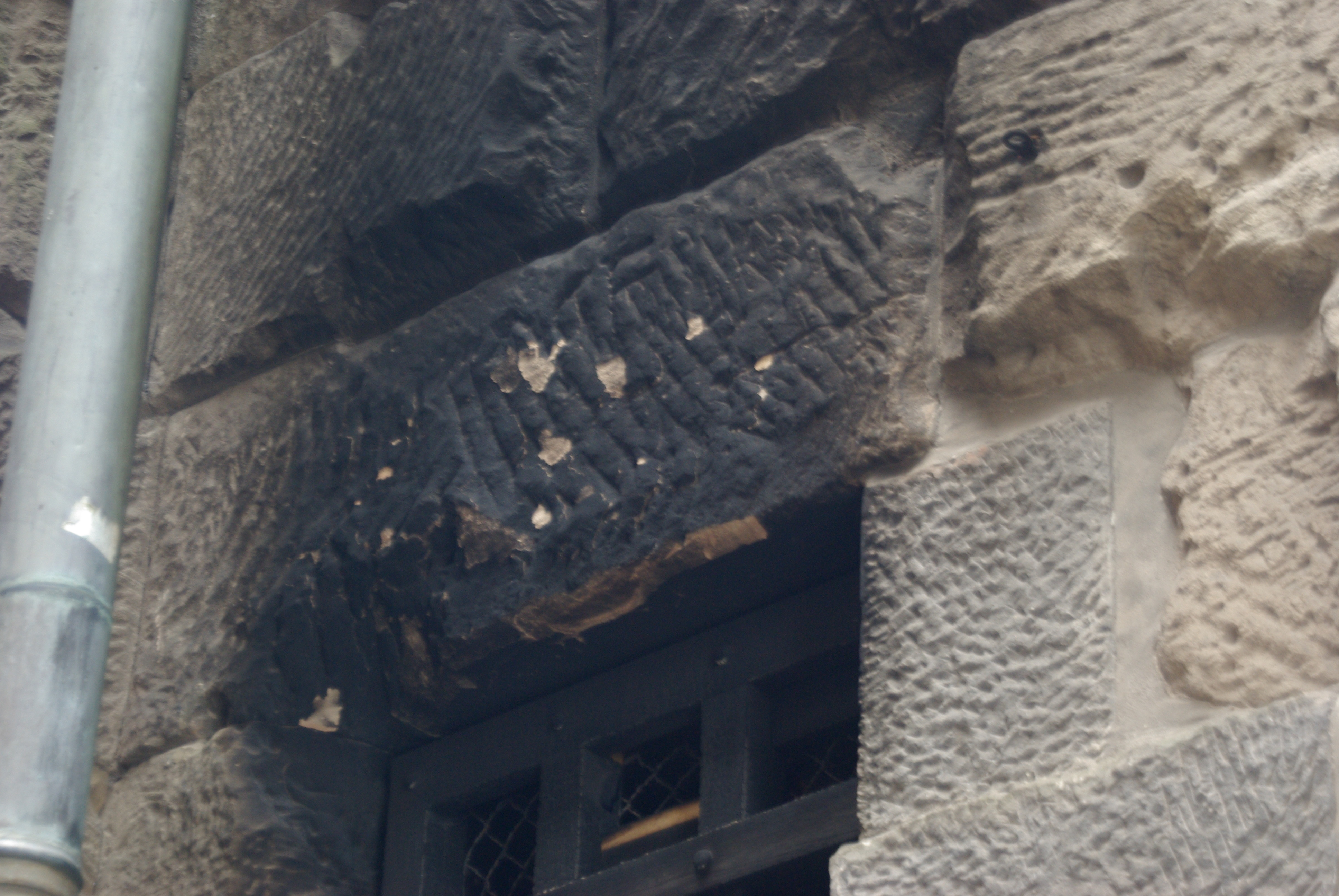 Porta Nigra, Brandschaden vom 27. Januar 2014